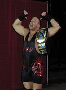 Rob Van Dam como campeón intercontinental